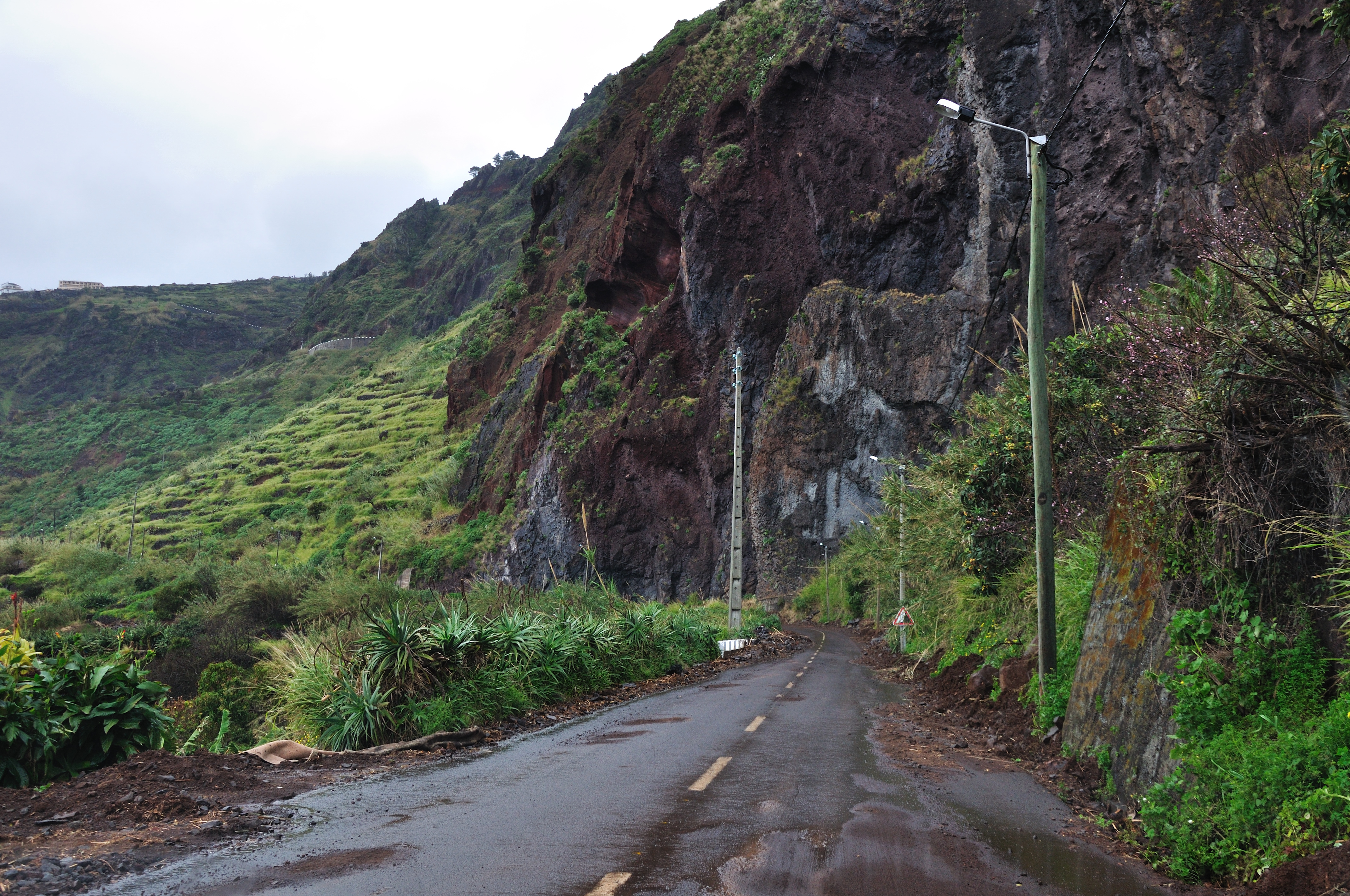 Portugal, Madeira, damaged road in Fajã da Ovelha after the 2010 floods